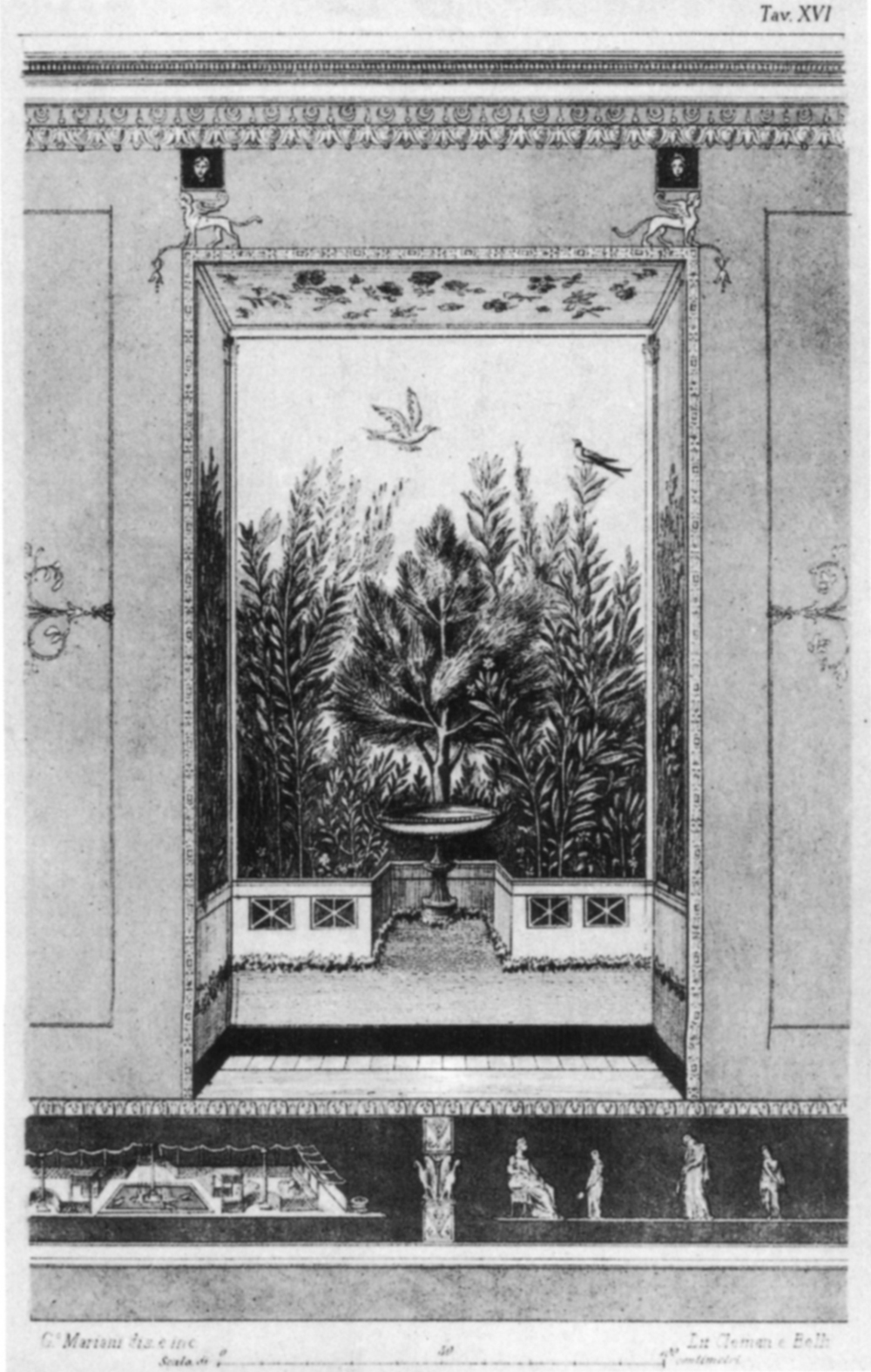 Disegno degli affreschi dell'auditorium mecenatis, 1874 circa